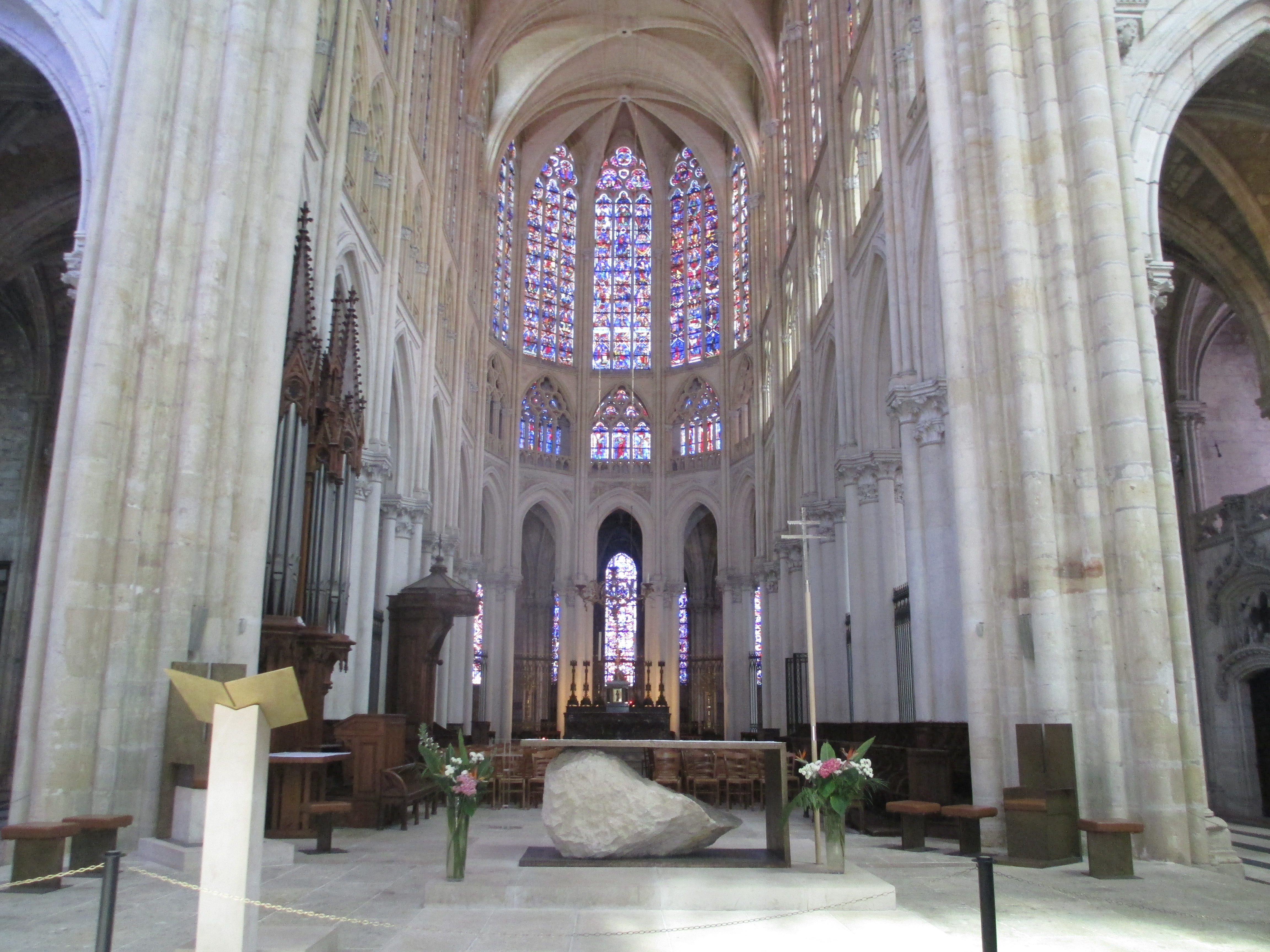 קתדרלת טור